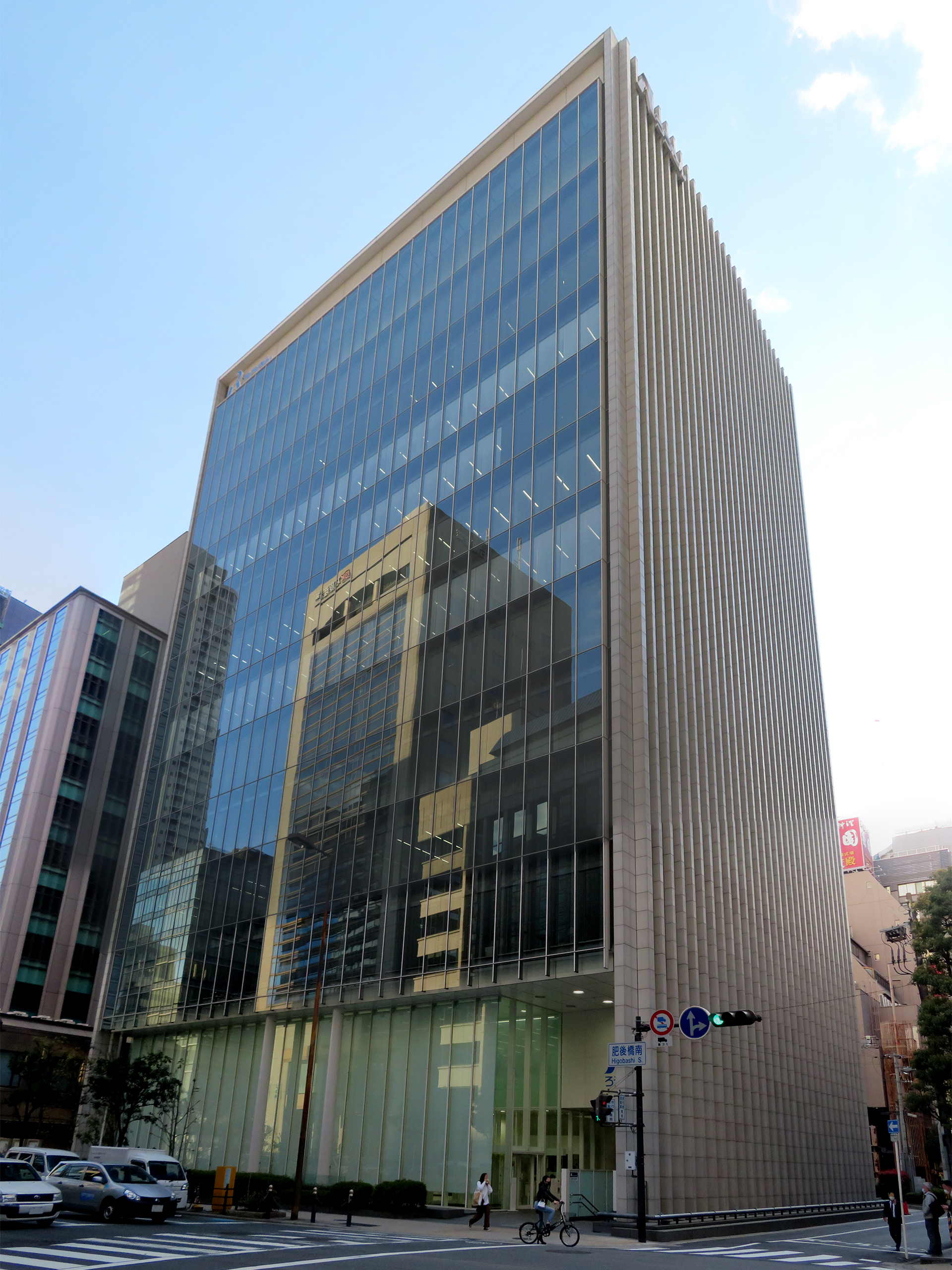 ろうきん肥後橋ビルを撮影。